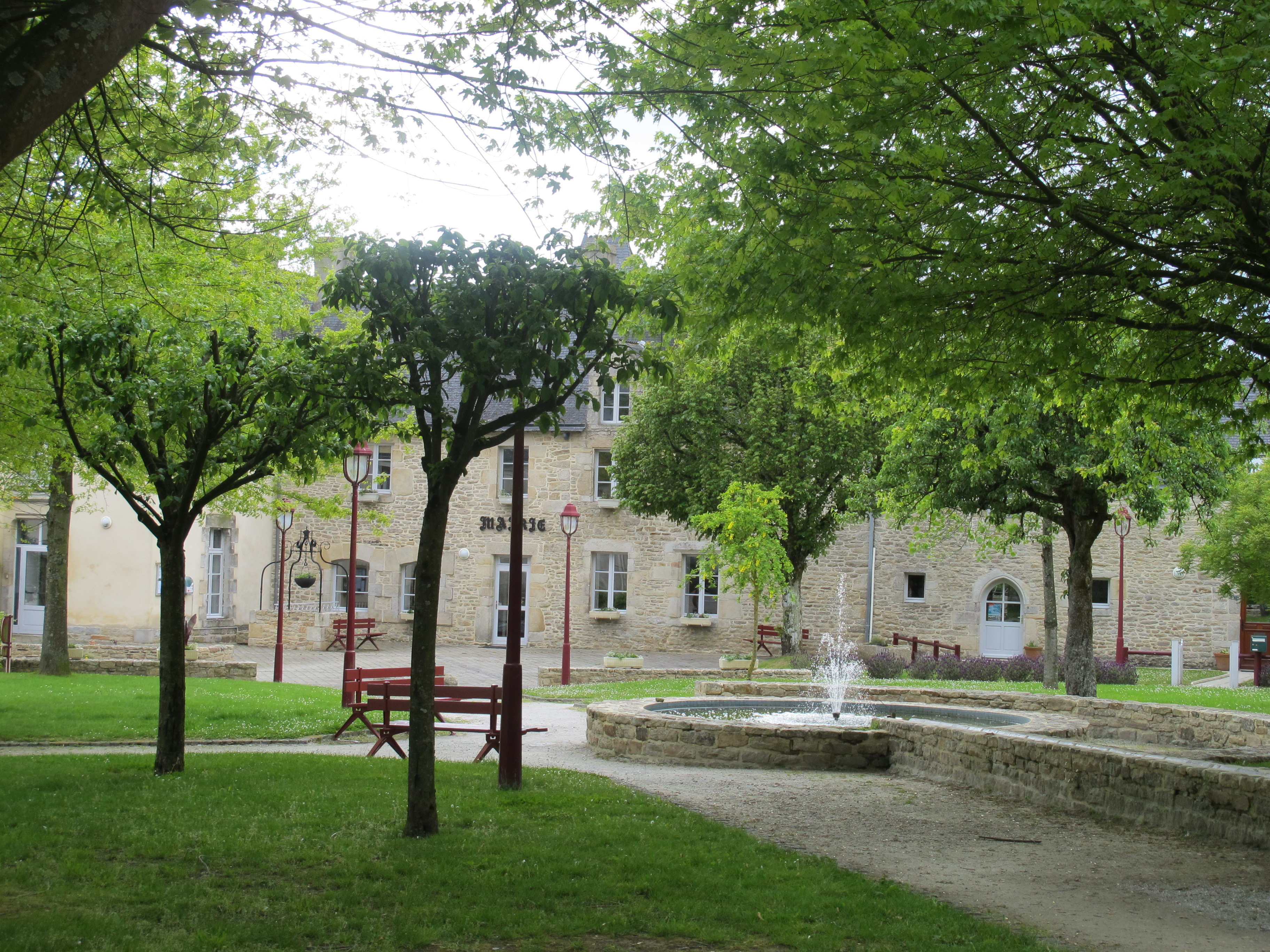 La mairie de la commune de Malansac